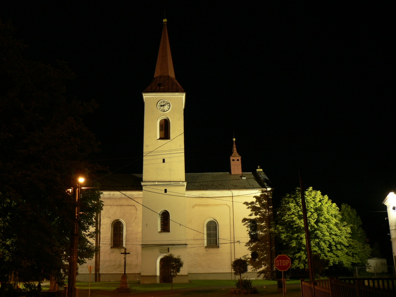 Kostel zasvěcený Panně Marii v Ženklavě v noci